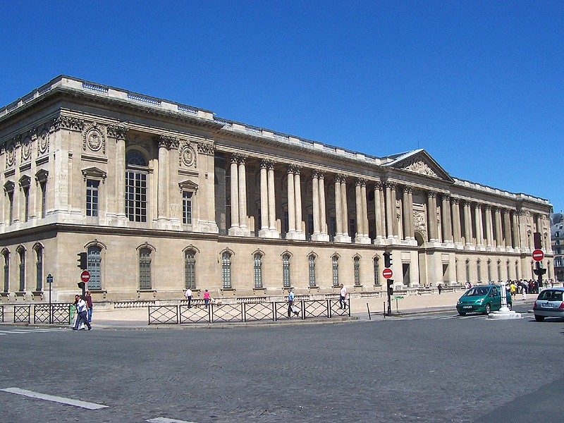 Parigi - Palais du Louvre (Colonnade)